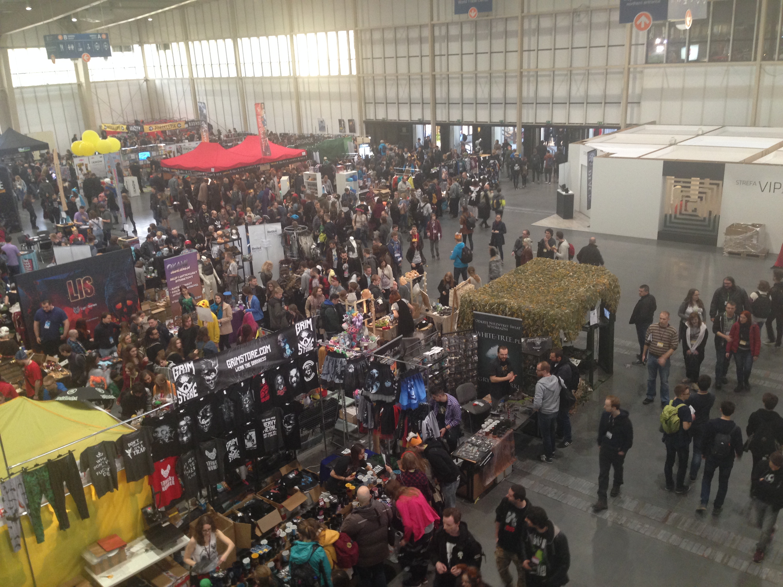 Pawilon wystawców podczas Pyrkonu 2017.